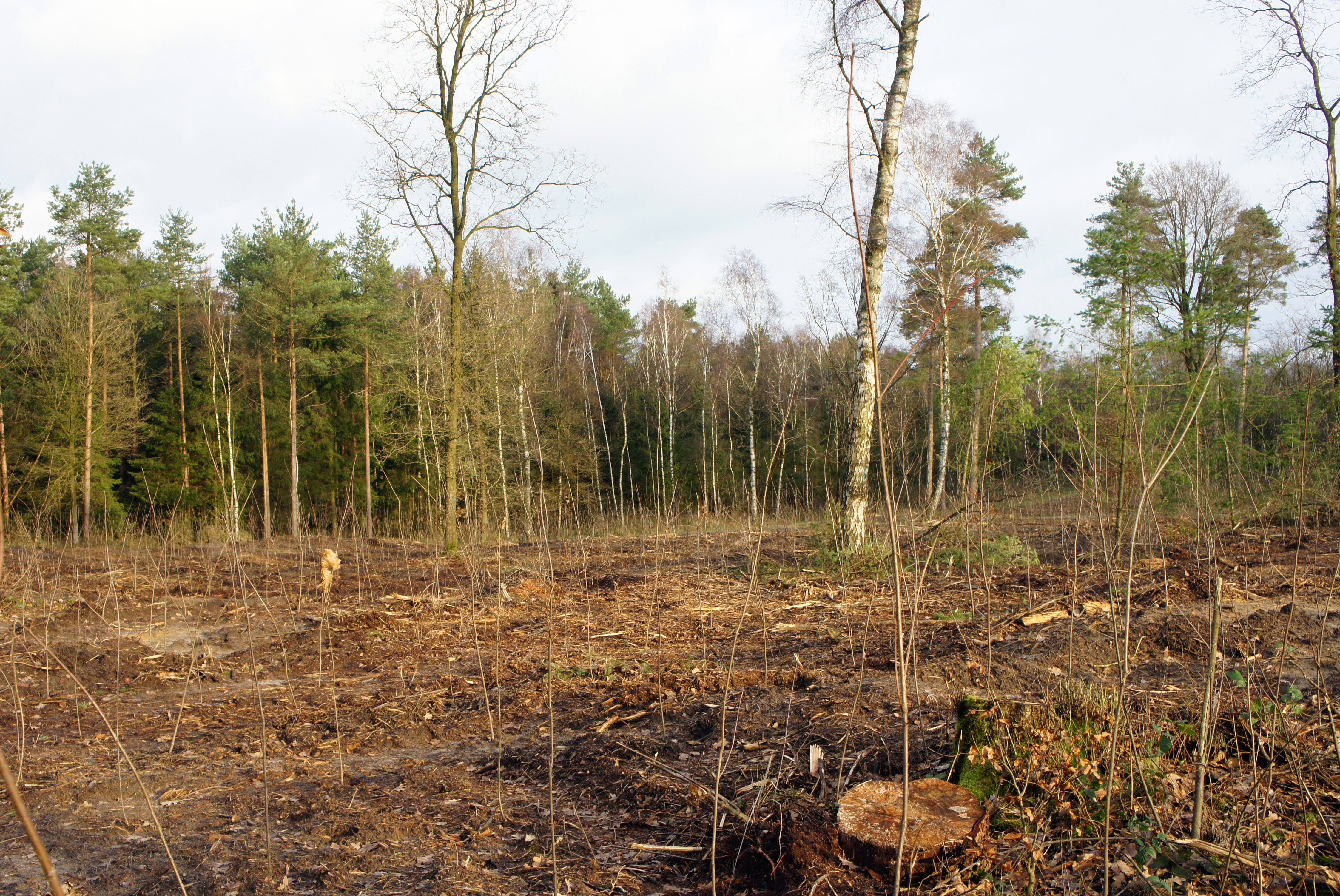 Aufforstung von 12000 Roteichen im Bürsteler Fuhrenkamp